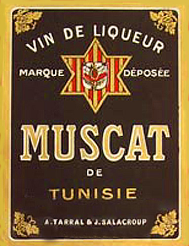 Vin de liqueur Muscat de Tunisie